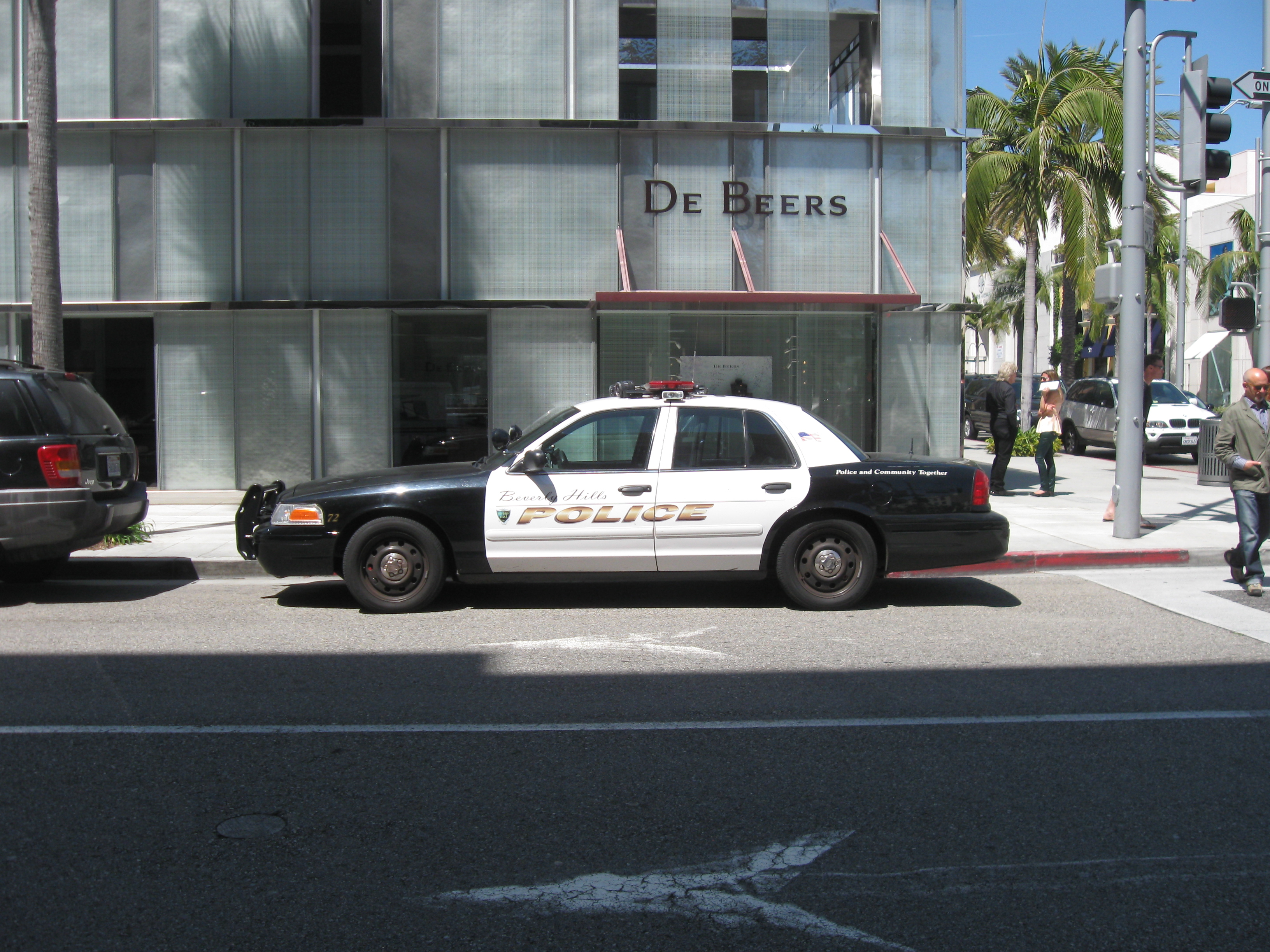 geparktes Polizeifahrzeug vor DeBeers in Beverly Hills, Kalifornien